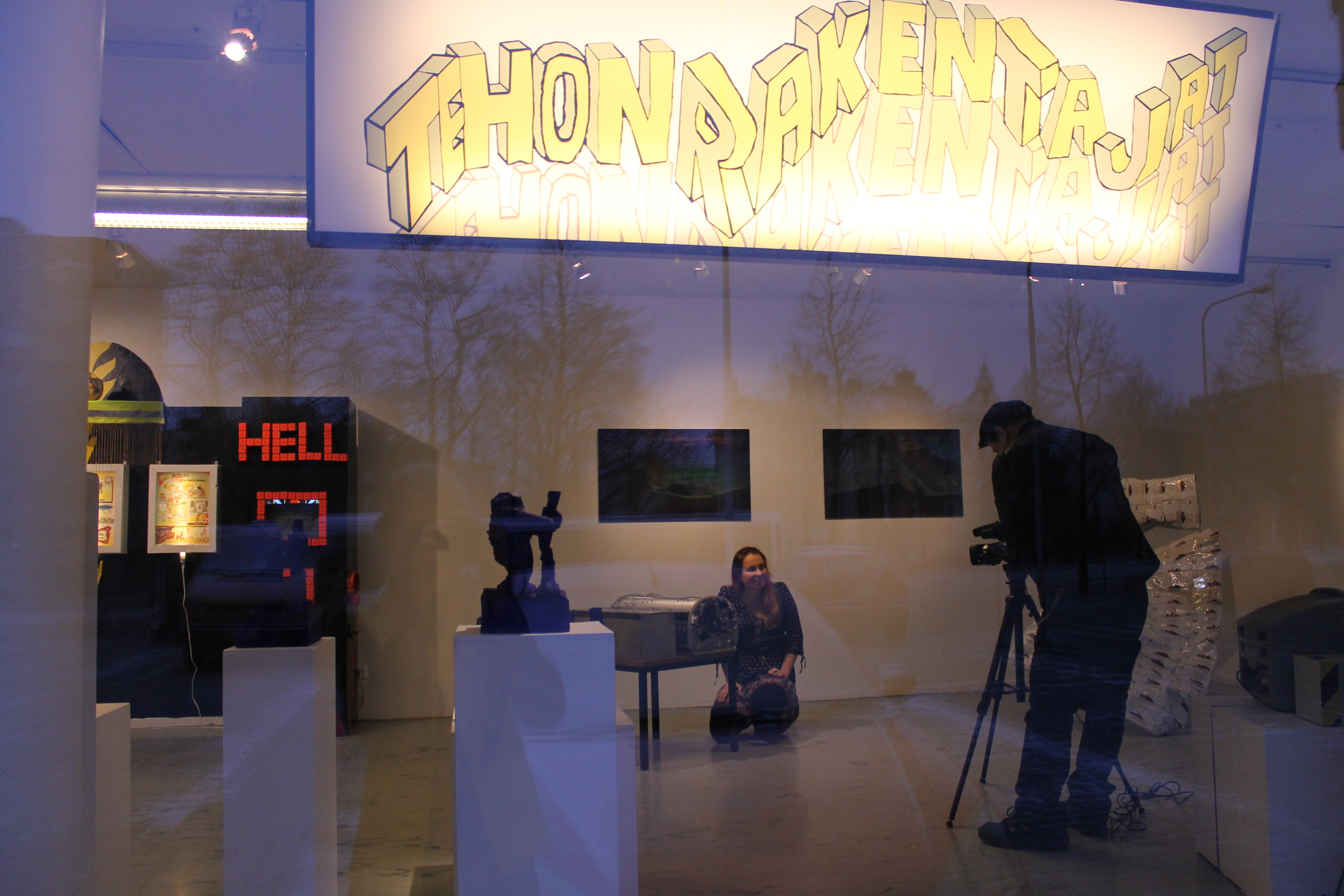 Tehonrakentajat Galleria Rajatilassa Tampereella 4.1.–21.1. 2014.